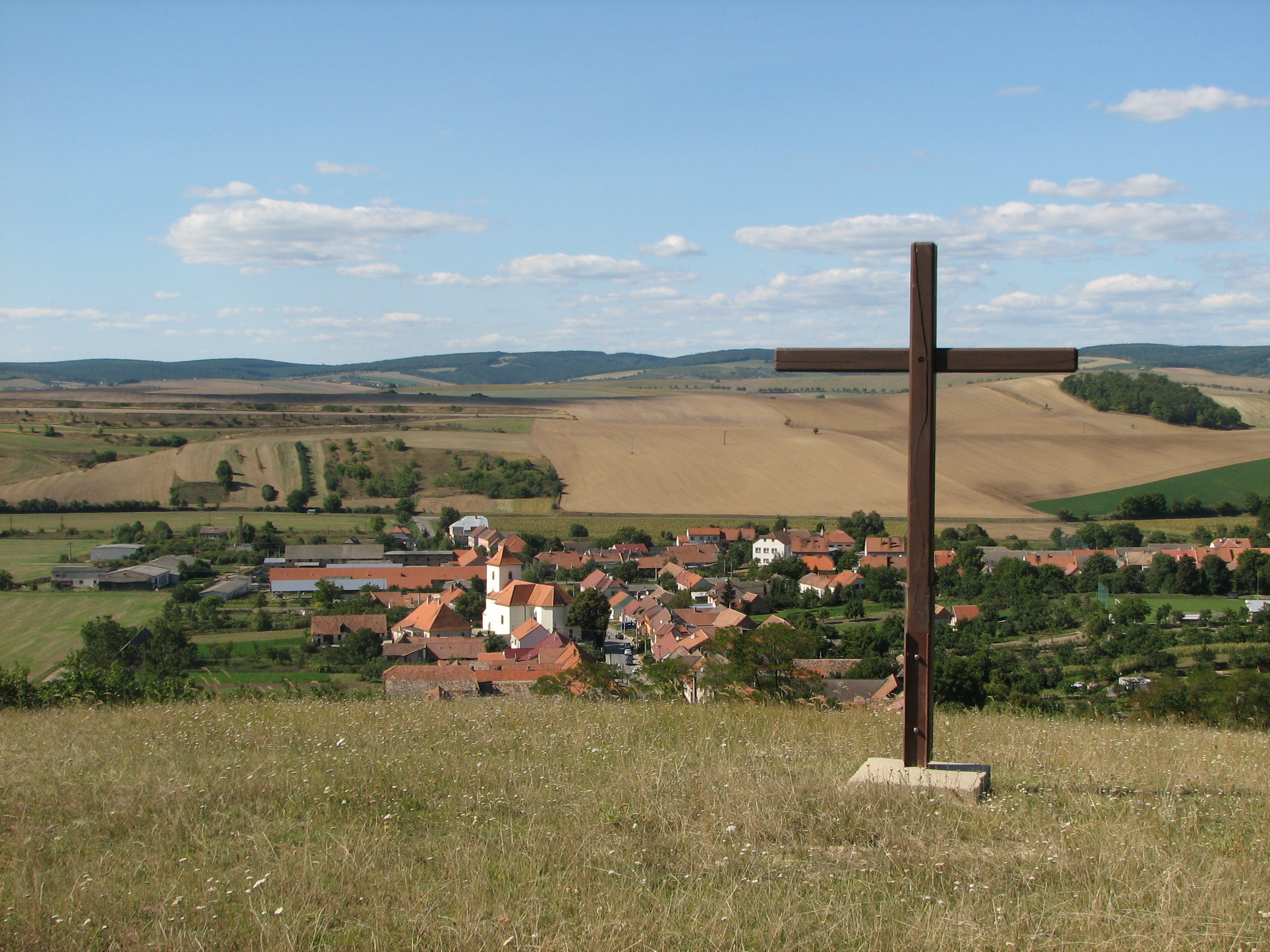 Česky: Želetice - celkový pohled